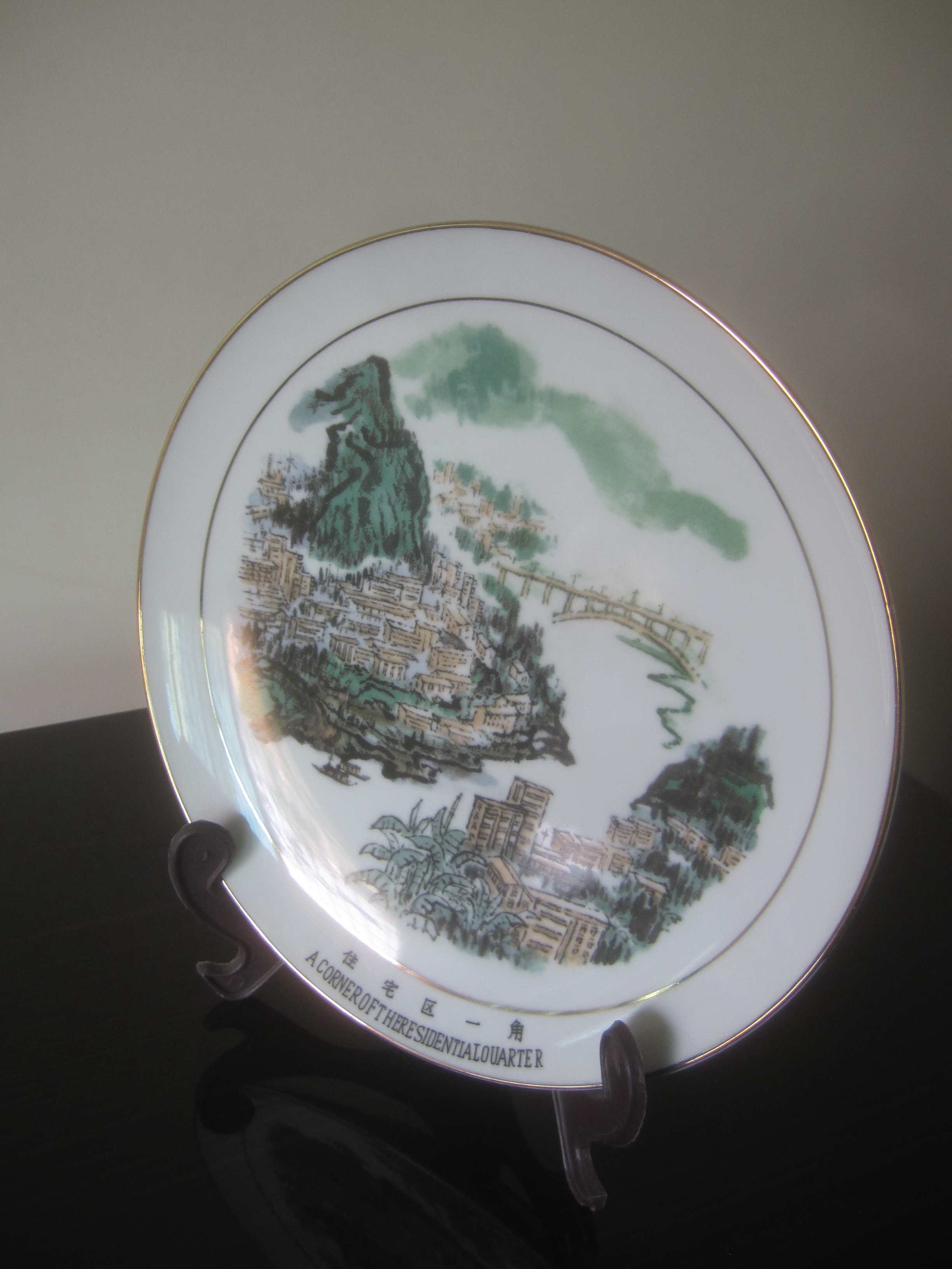 一个绘有渡口大桥的盘子。